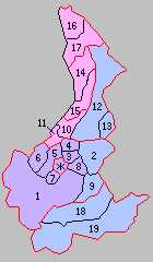 北海道札幌支庁（石狩支庁）の町村。